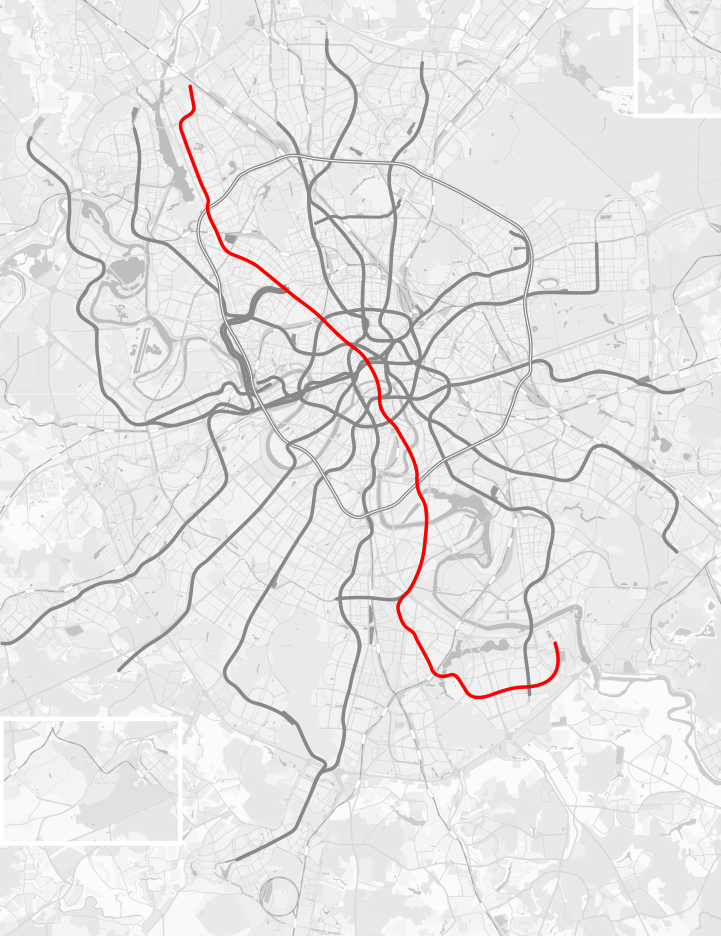 Замоскворецкая линия Московского метрополитена